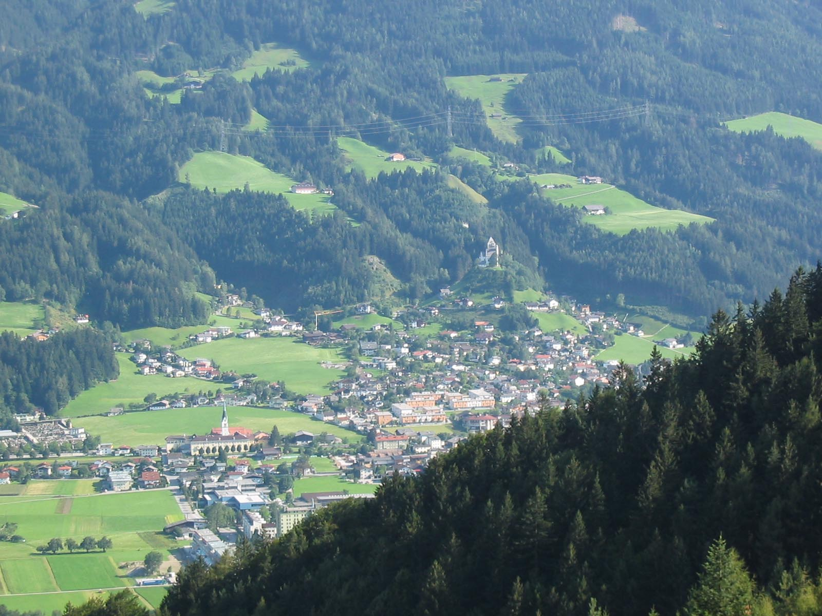 Schwaz, Tyrol